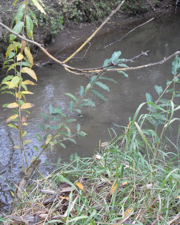 Устье реки Старка (Кова) при впадении в Рахму (справа)